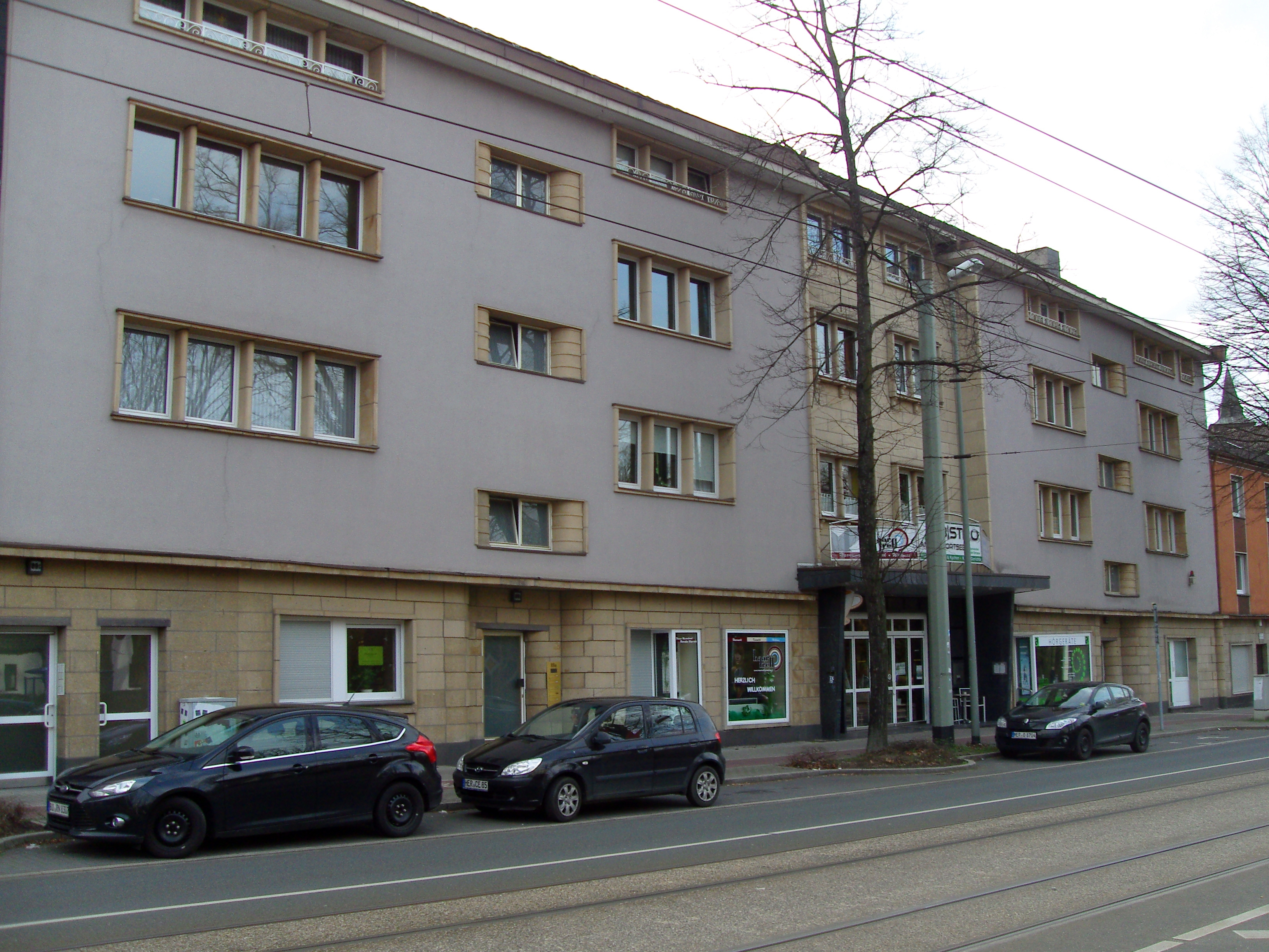 Hauptstraße 89 in Herne-Eickel This is the photograph of an architectural monument. It is part of the list of cultural monuments of Herne, no. 716